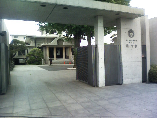 信行寺